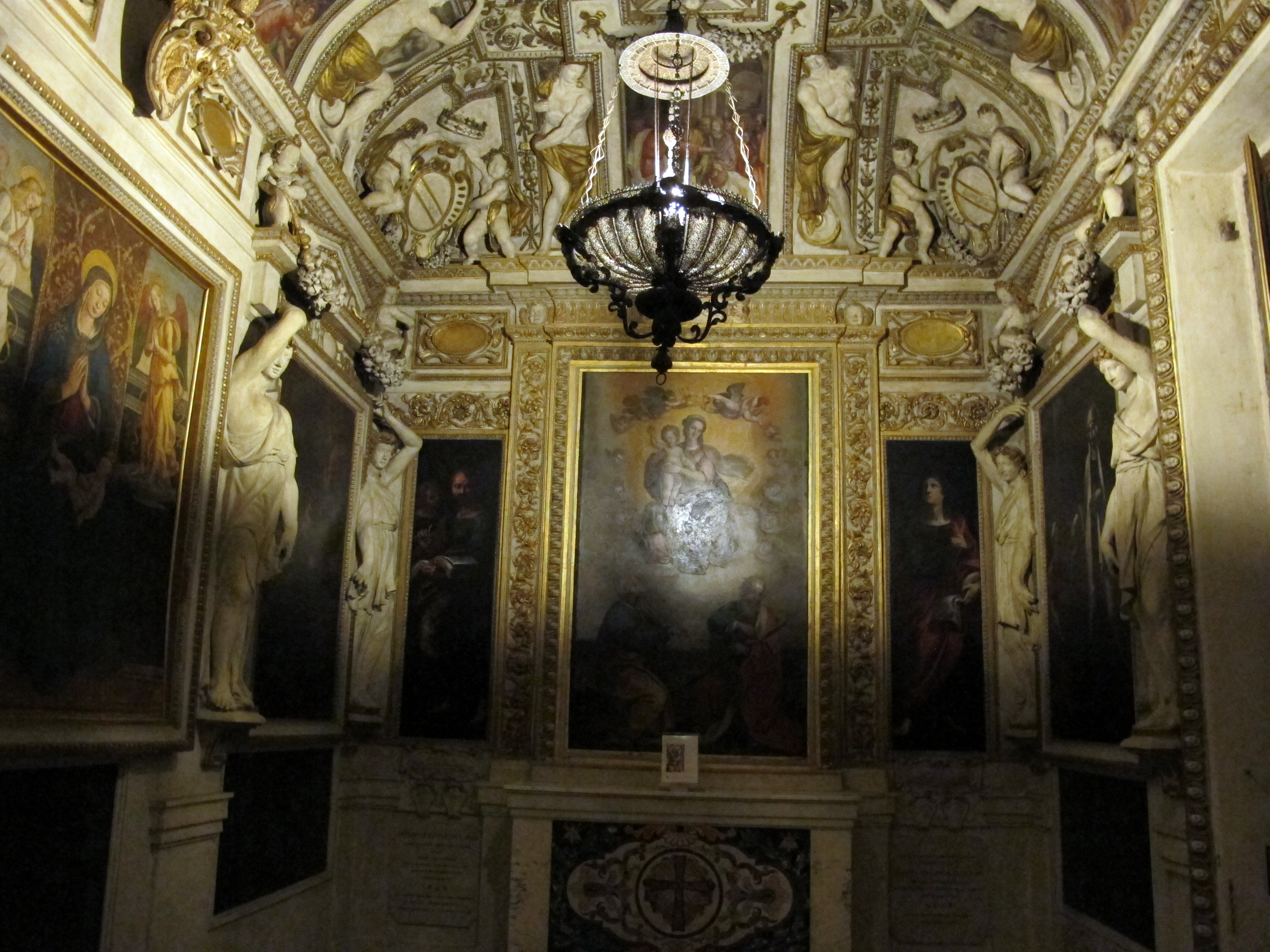 Collezione dei Musei Capitolini